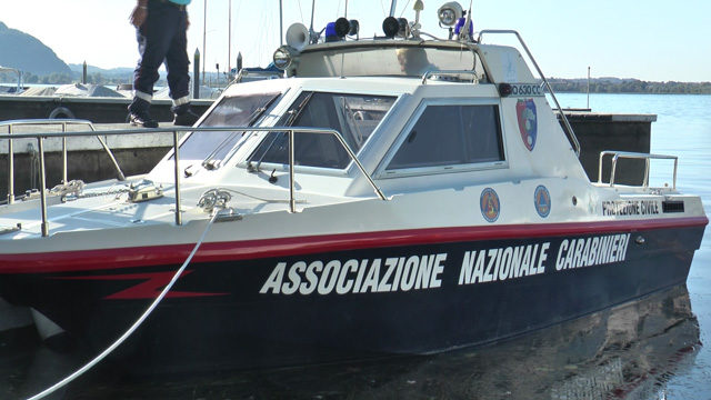 Motovedetta dell'Associazione Nazionale Carabinieri in uso presso il Lago d'Iseo